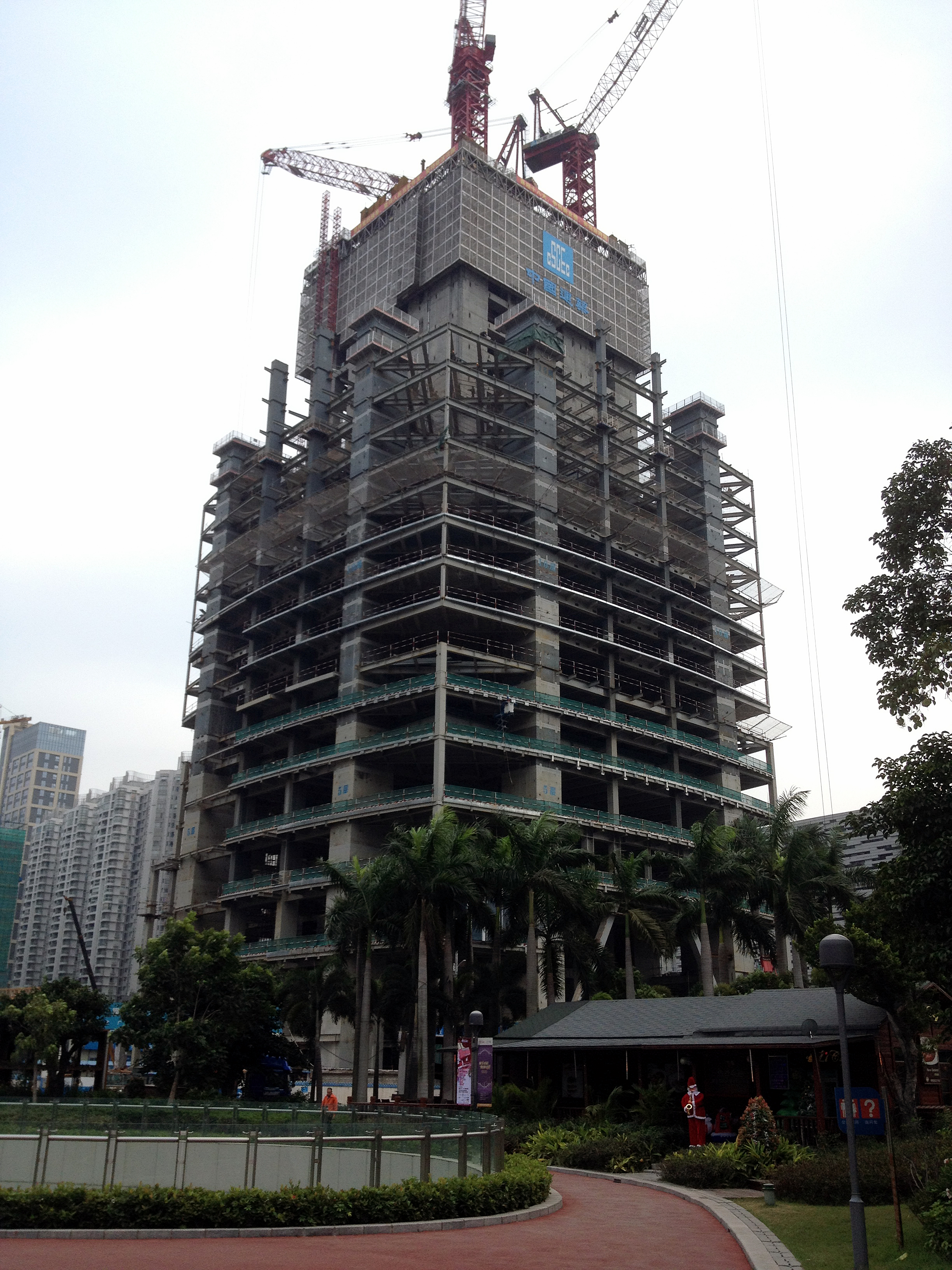 建造中的广州东塔（2012年）